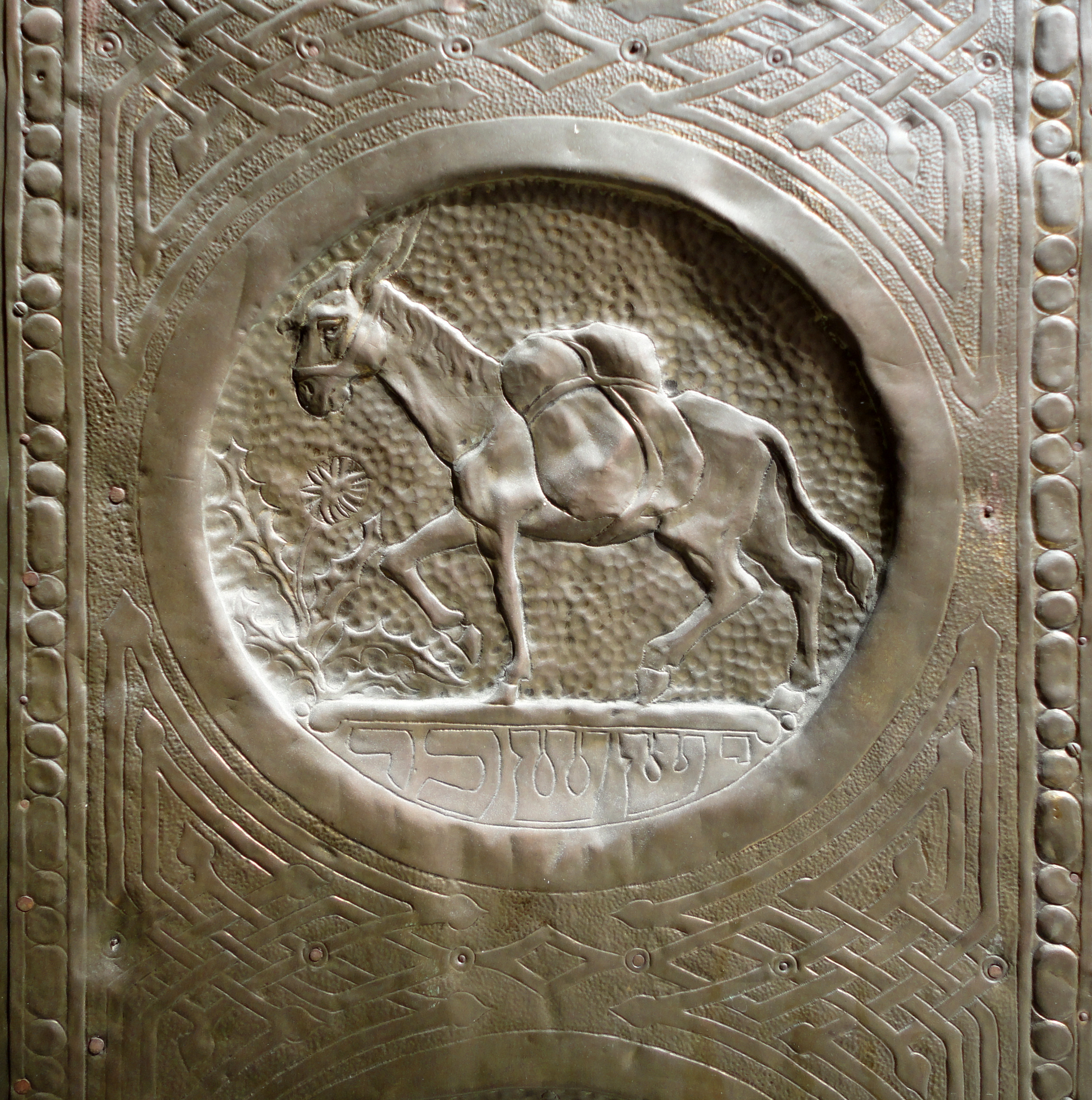 בית החולים ביקור חולים הוא בית חולים שנוסד באמצע המאה ה-19 בעיר העתיקה בירושלים, ועבר בשנת 1925 למושבו ברחוב הנביאים פינת רחוב שטראוס, שם הוא שוכן ופועל היום.